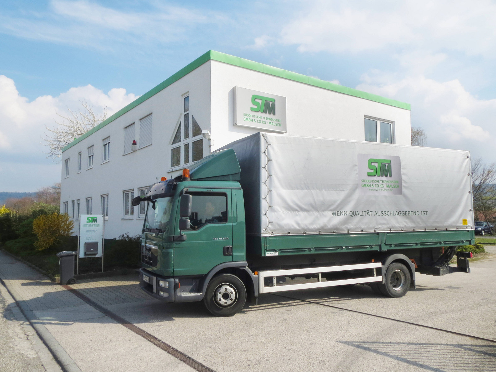 Süddeutsche Teerindustrie Malsch: Das Büro- und Verwaltungsgebäude -aktuelle Ansicht.